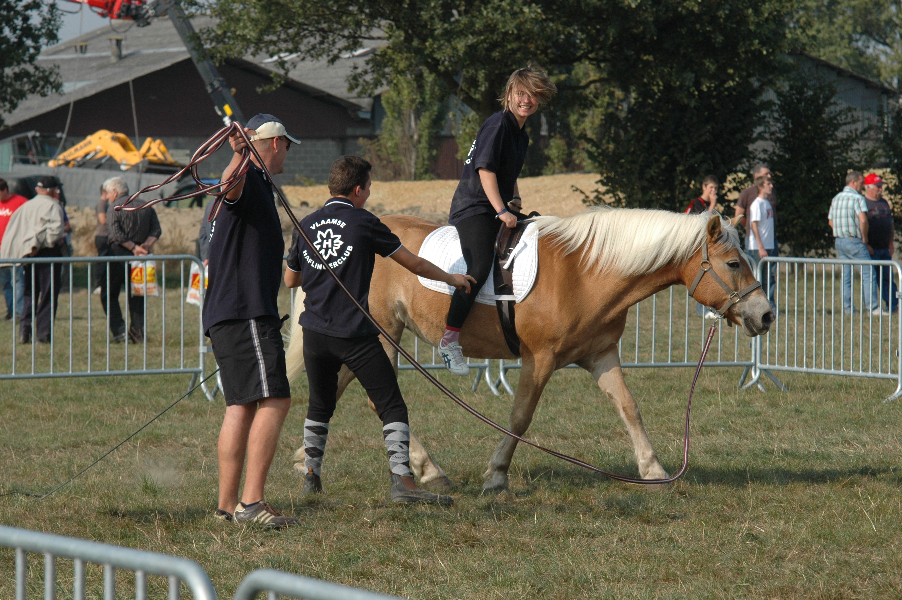 Haflinger